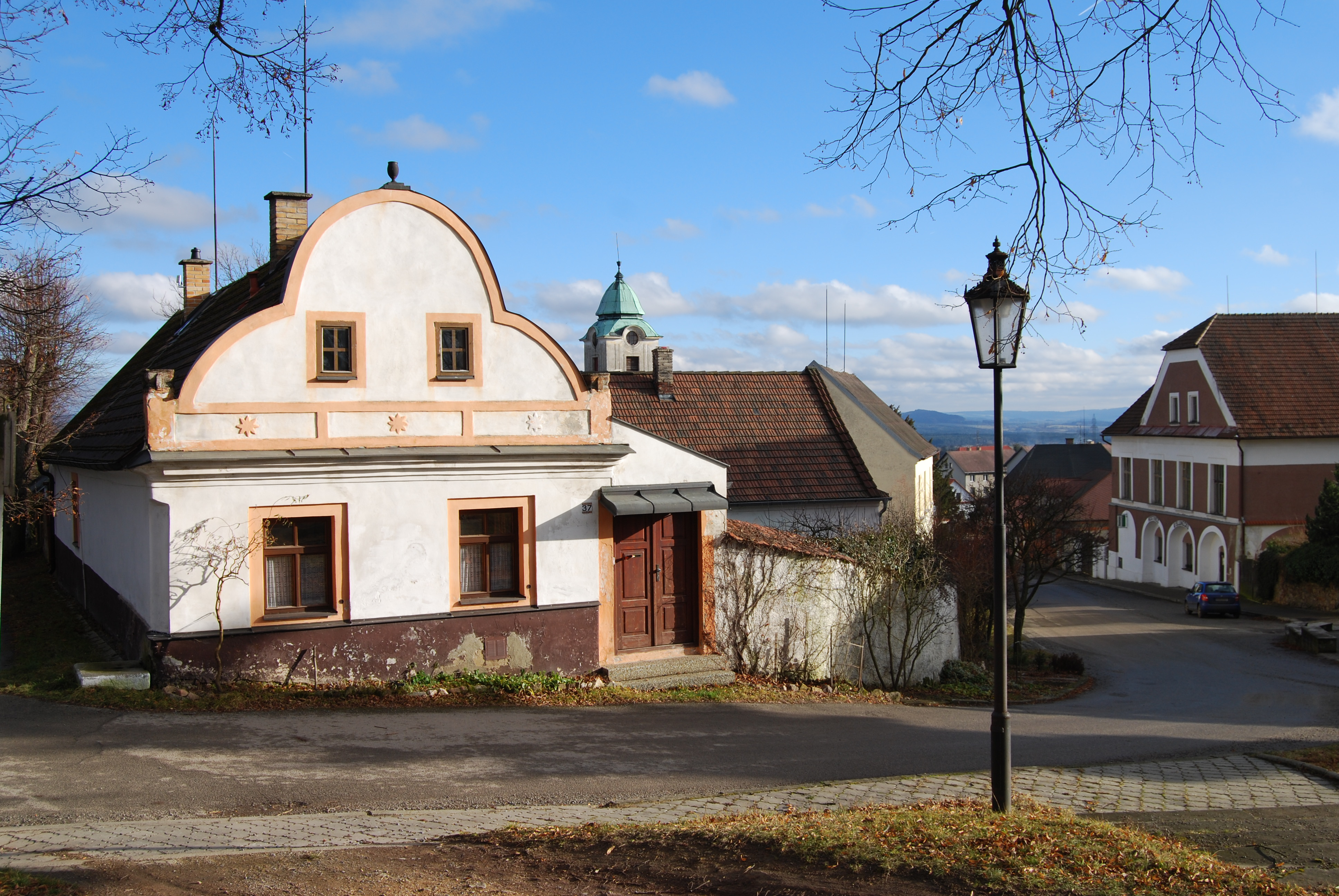 Pohled od kostela sv. Petra a Pavla na venkovskou usedlost čp. 37. Chotoviny v okrese Tábor v Jihočeském kraji. Česká republika.